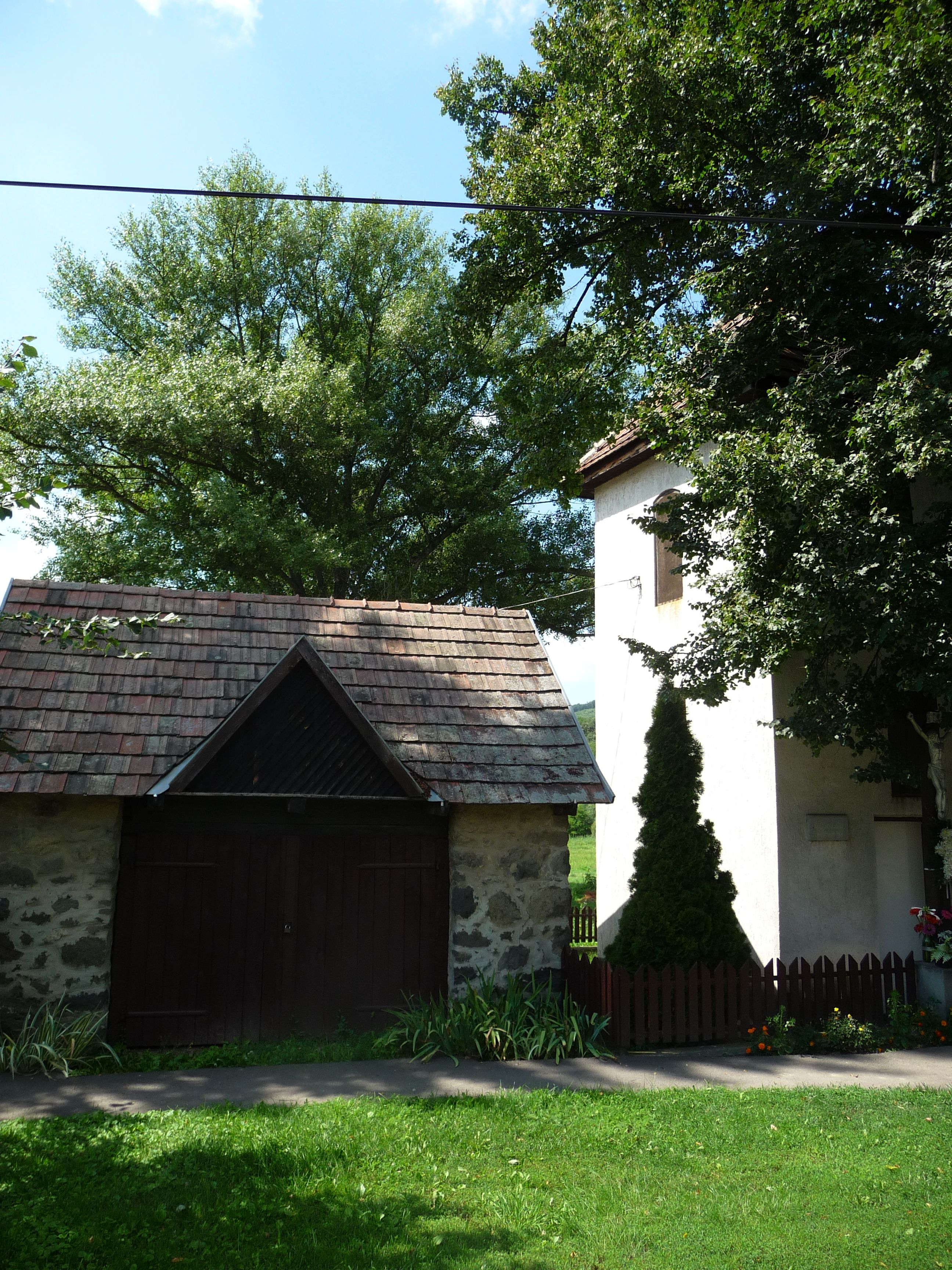 Felsőtoldi Szent Imre katolikus kápolna, a háttérben a harangtoronnyal